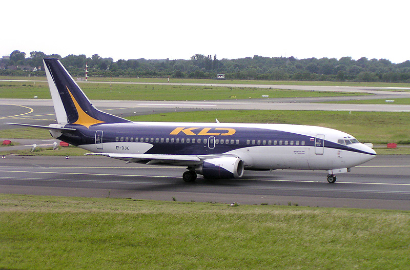 KD Avia Boeing 737-300 (EI-DJK) in Düsseldorf (EDDL)